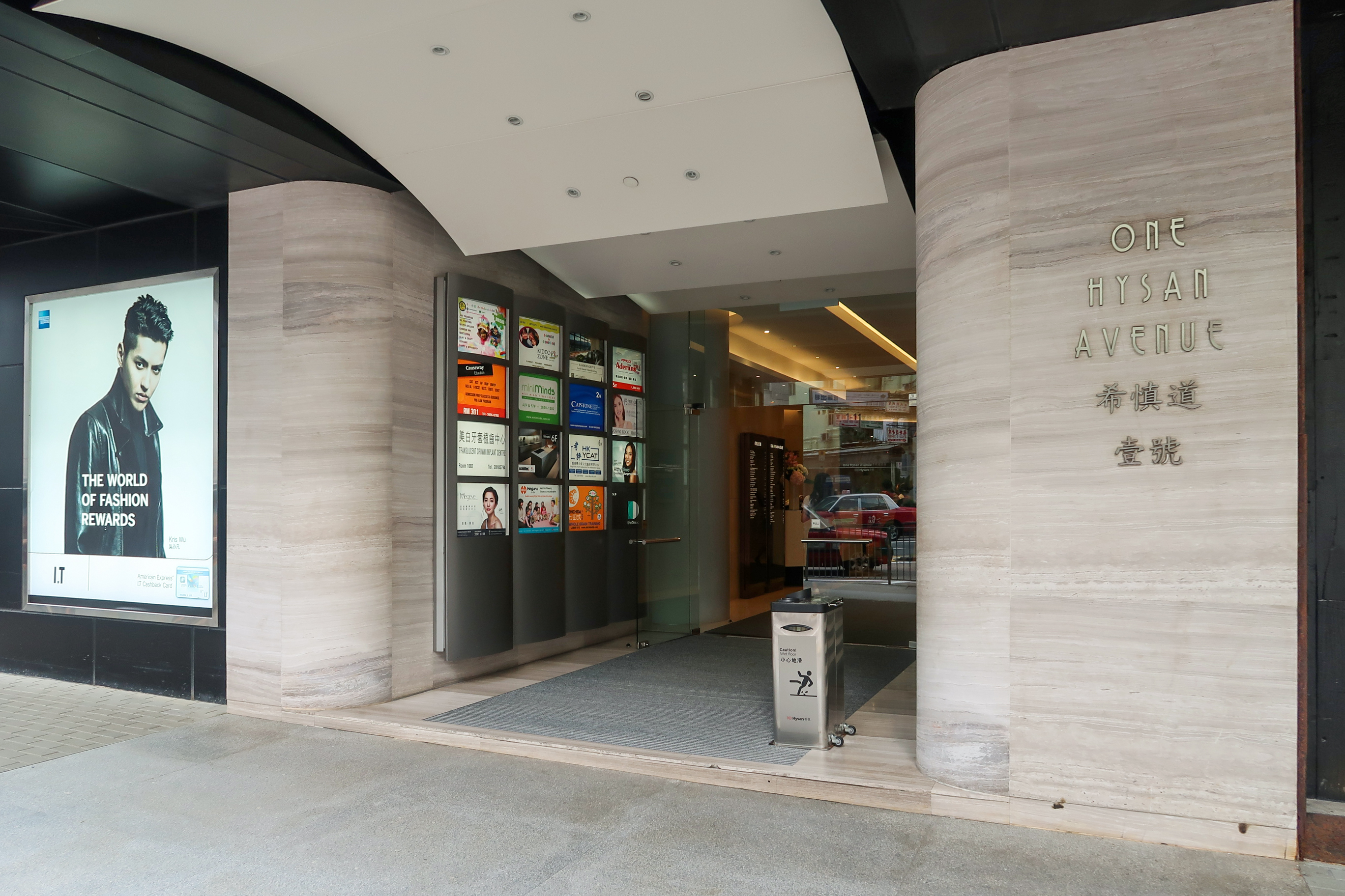 One Hysan Avenue Entrance